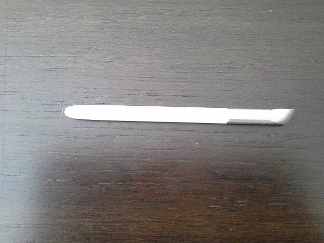 هذا قلم S,لسامسونج جلاكسي نوت 10.1